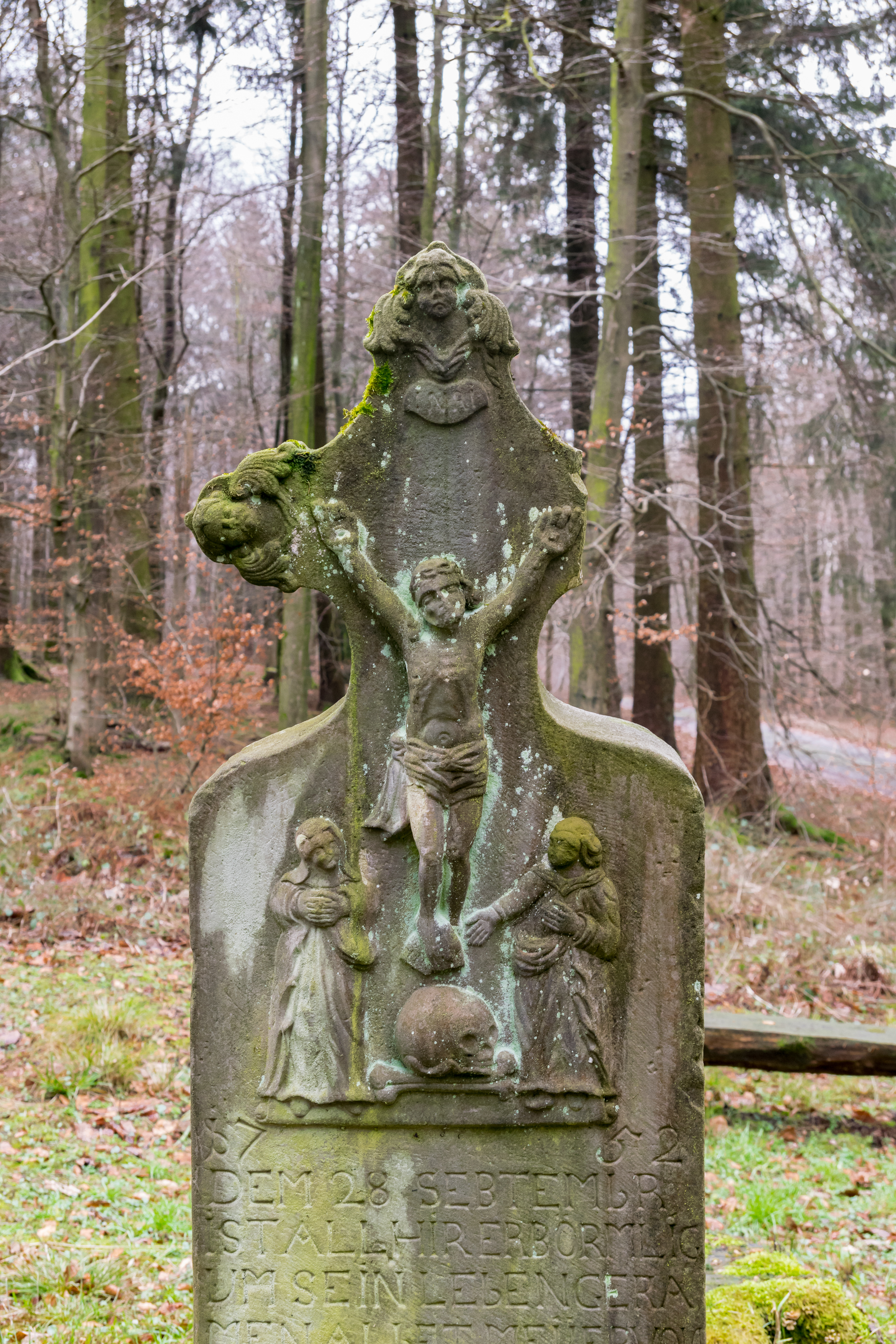 Gedenkstein Messerkerl im Wald am Schnittpunkt Altenbeken-Schlangen-Horn-Bad Meinberg